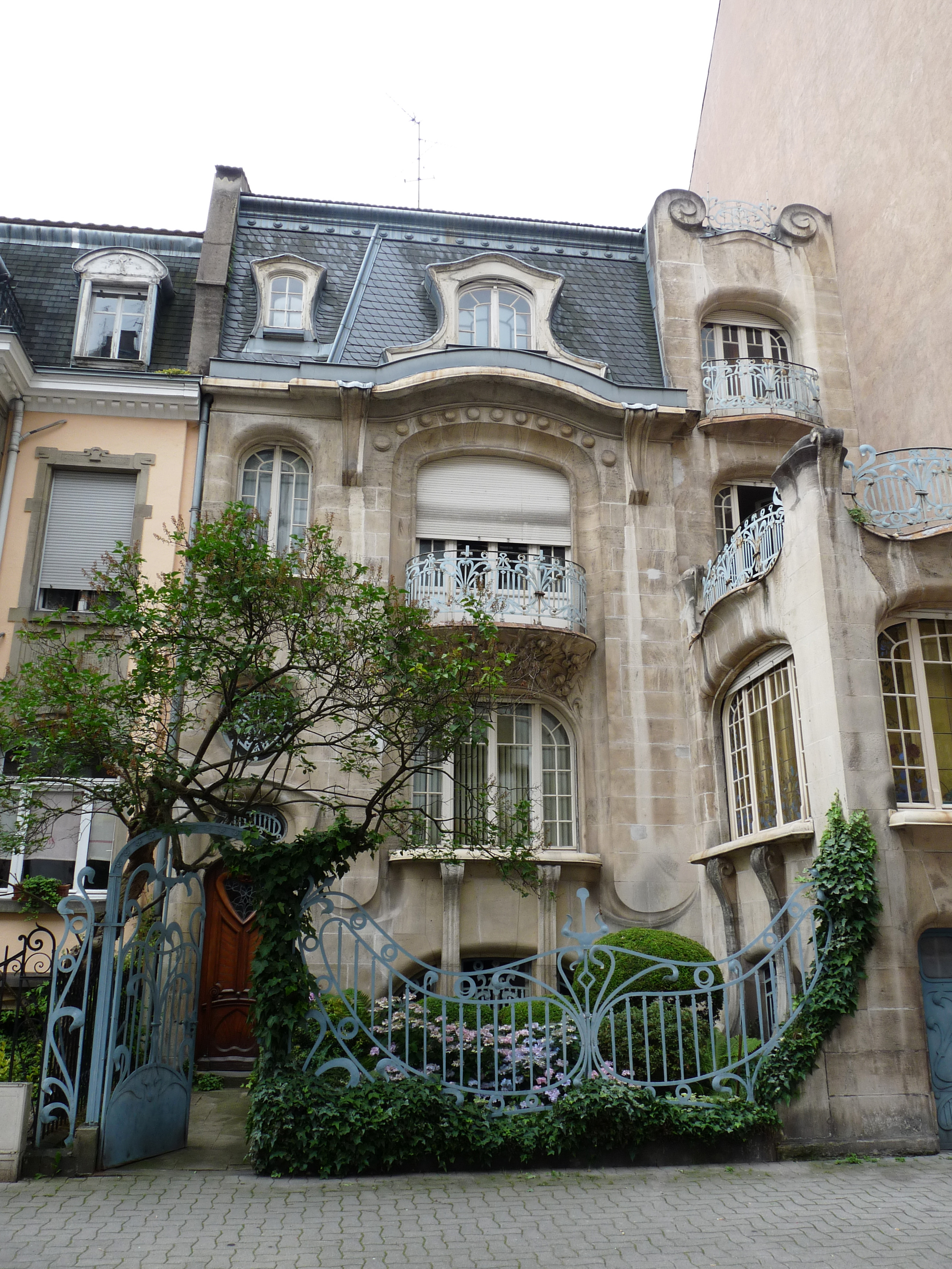 Strasbourg : Hôtel Brion, 22 rue Sleidan. Hôtel de style Art Nouveau construit par et pour Auguste Brion (1861-1940) en 1904. Transformé en 1929 en pension de famille dénommée Hôtel Marguerite. Façade et toiture sur rue, y compris la grille d'entrée, inscrits aux Monuments historiques en 1975.